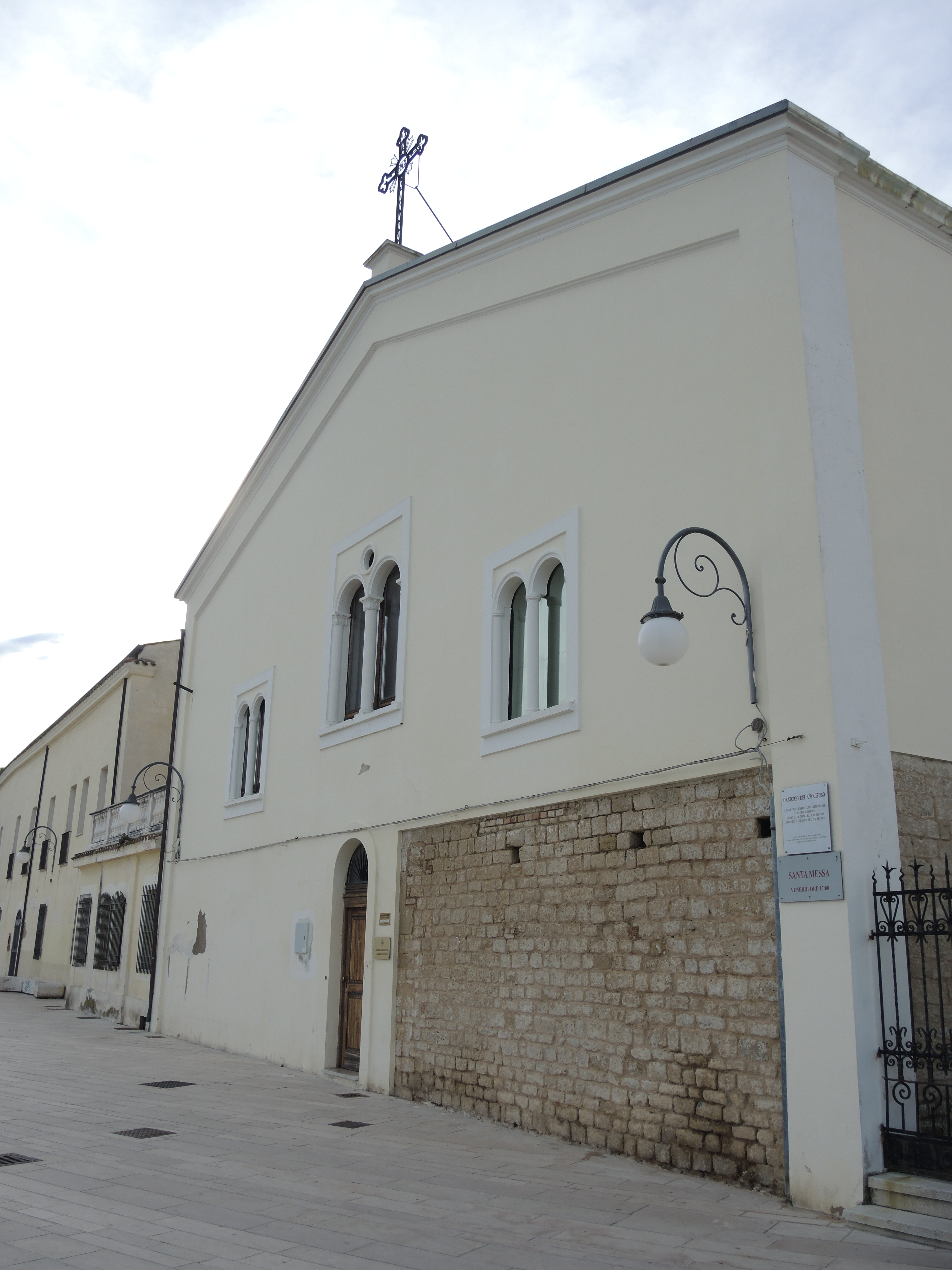 Ortona: Chiesa di Santa Caterina d'Alessandria